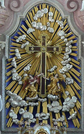 Goldkreuz im Hochaltar der Wallfahrtskirche Heiligenkreuz